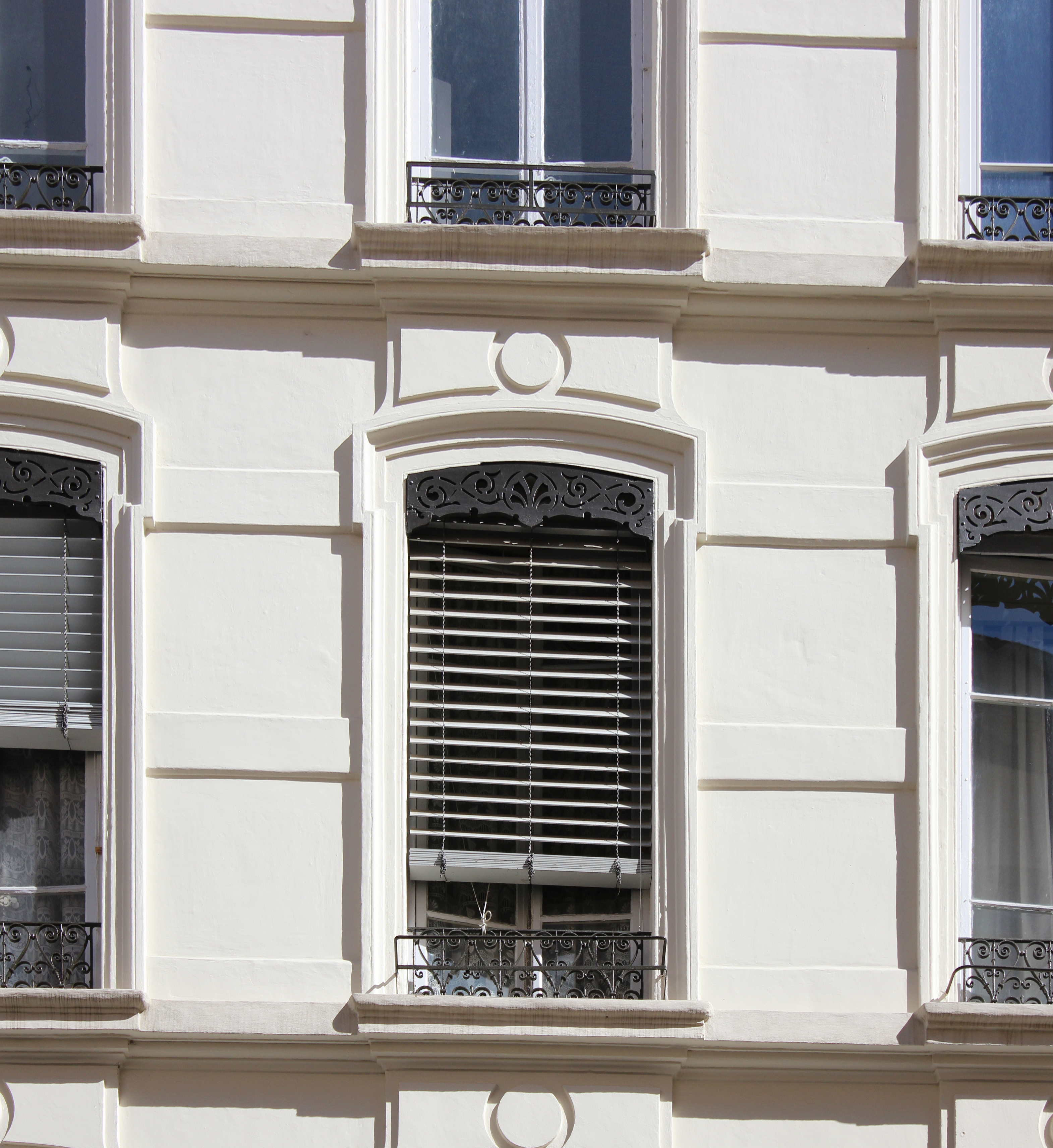 Jalousies à Lyon.